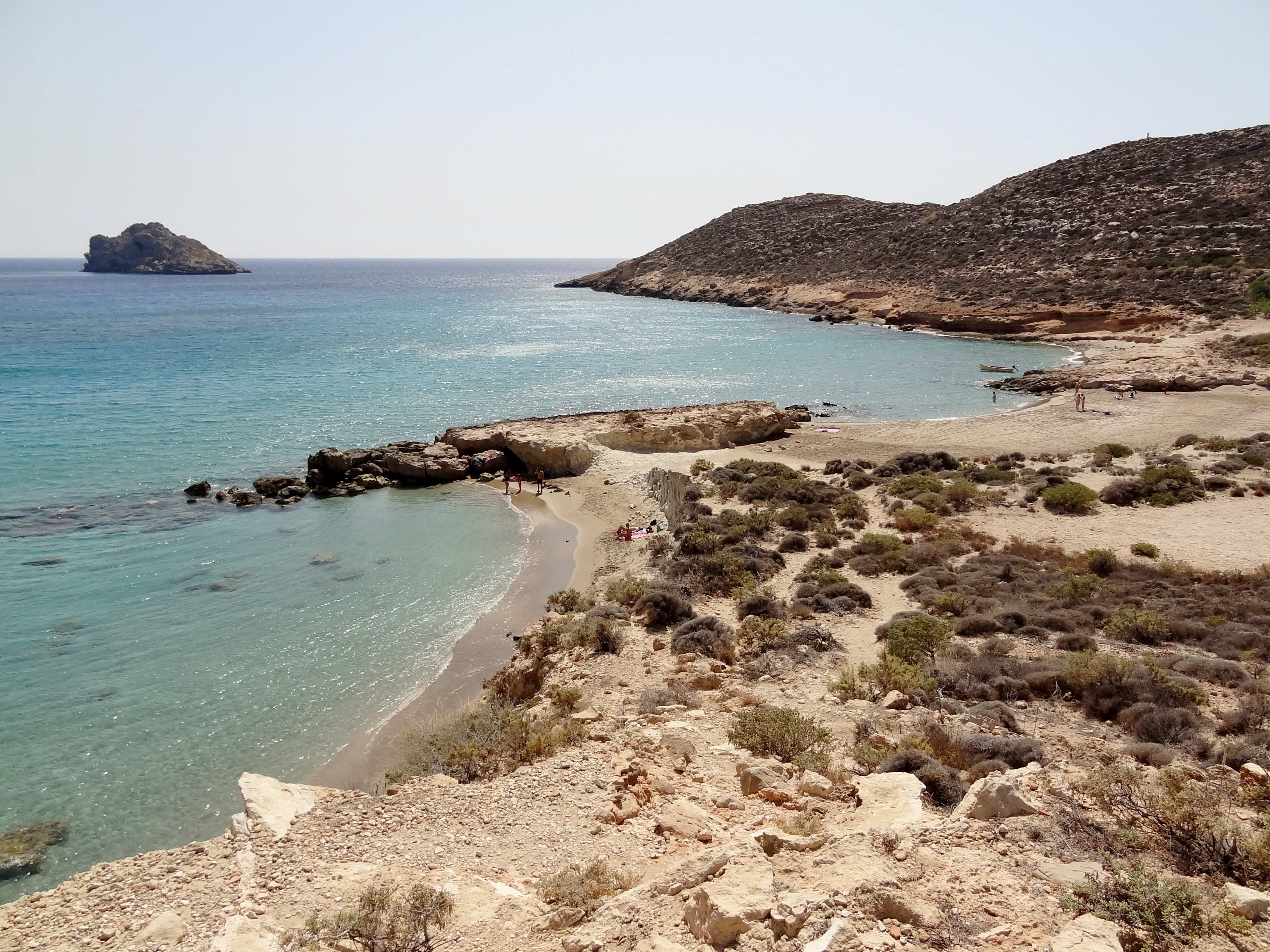 Paralia Gerondolakkos (Παραλία Γεροντόλακκος ‚Strand der Grube der Alten‘), Strand an der Südostküste Kretas bei Xerokambos (Ξερόκαμπος), Gemeinde Sitia, Kreta, Griechenland